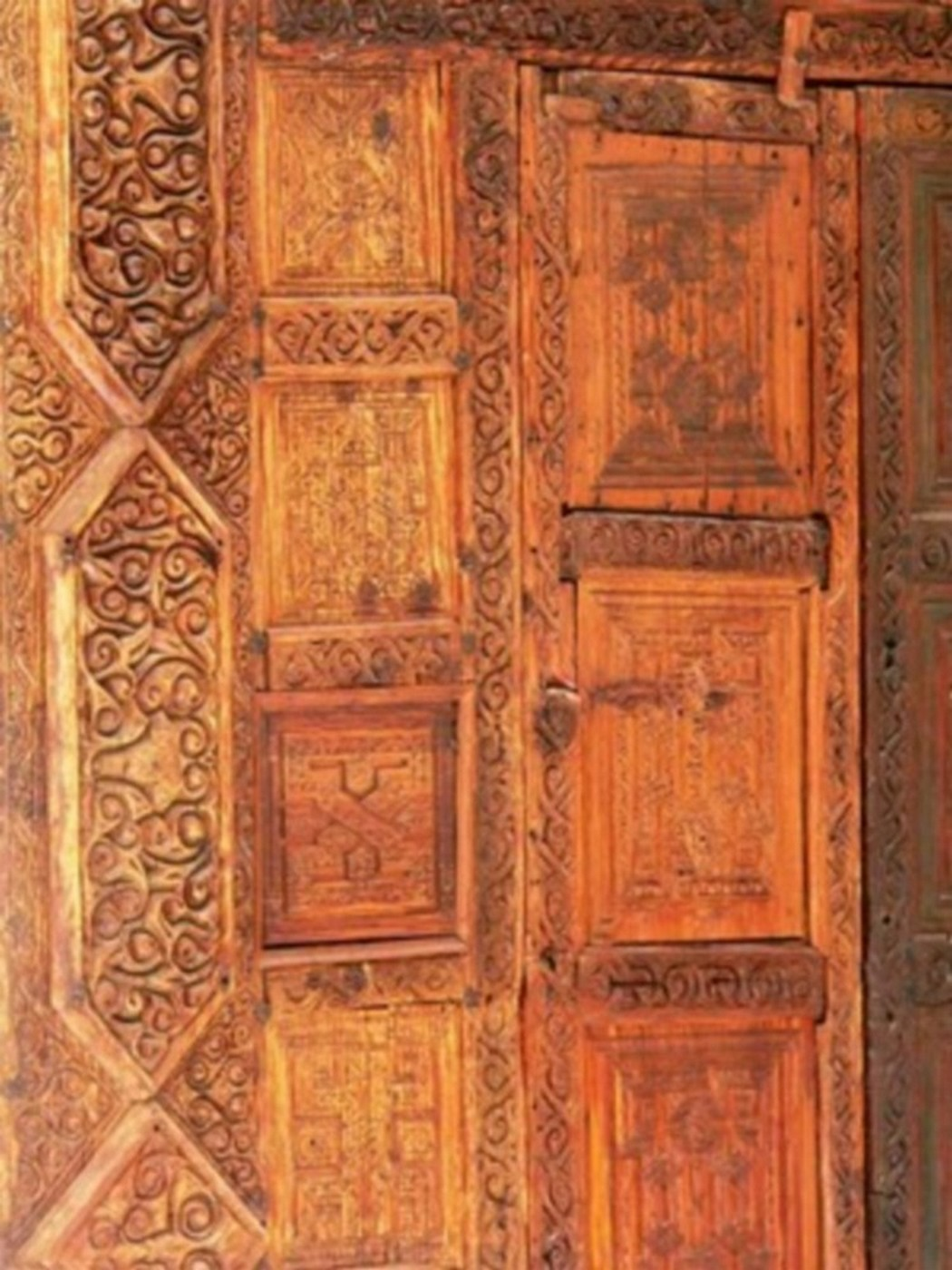 Gros plan partiel de la porte de l'antichambre de la maqsura de la Grande Mosquée de Kairouan, en Tunisie. Cette œuvre, faisant partie des collections du musée des arts islamiques de Raqqada, est exposée au Centre de présentation du patrimoine de Kairouan, situé en face de la Grande Mosquée.